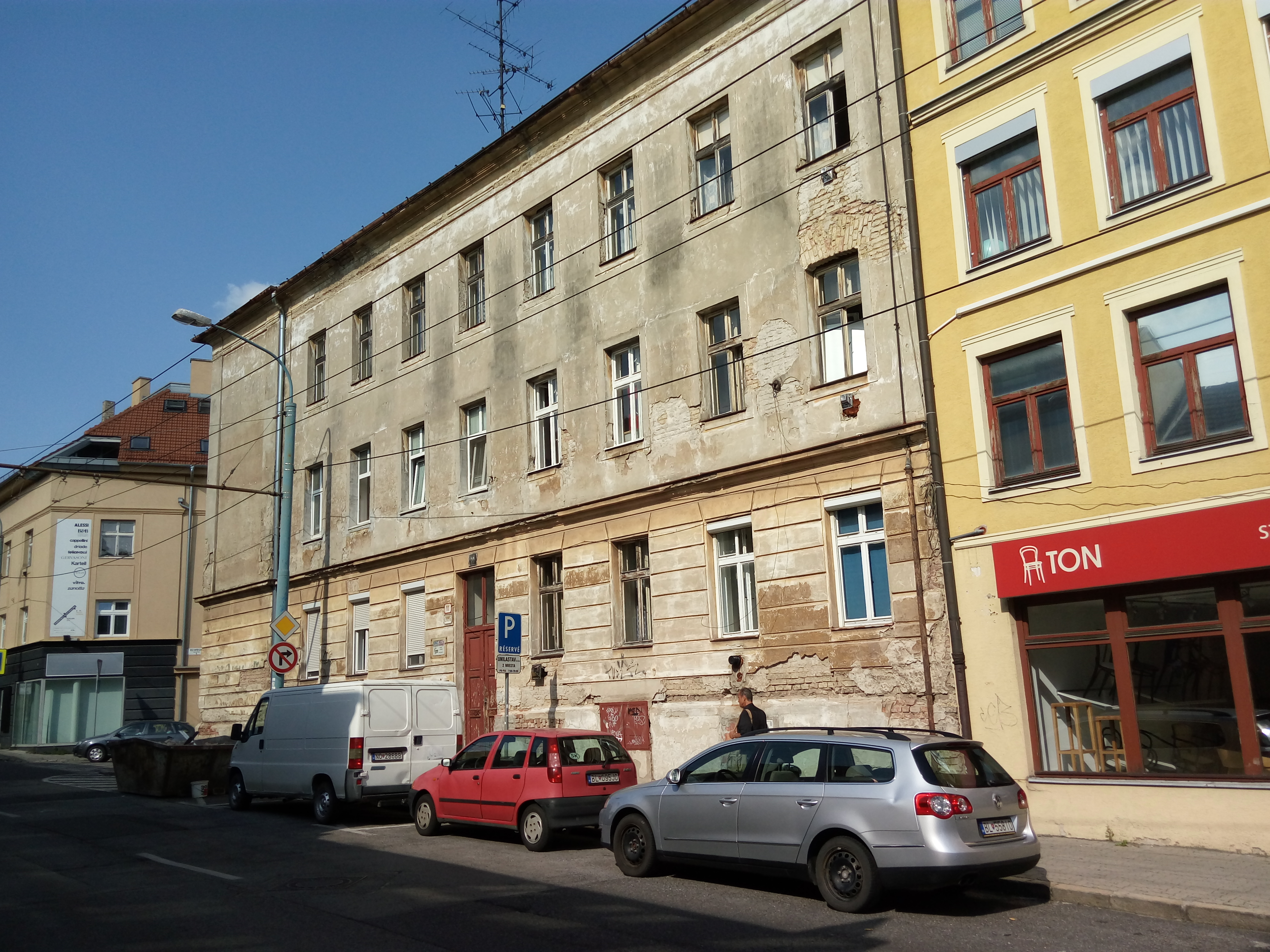 Karpatská 10, Staré Mesto, Bratislava